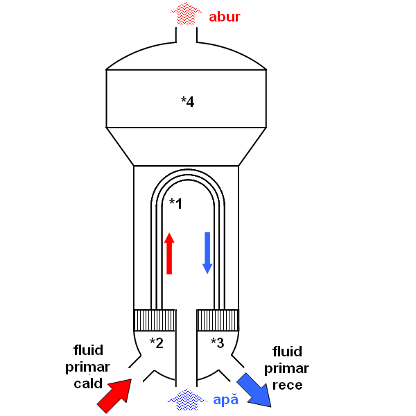 Schema unui generator de abur pentru o CNE de tip PWR.